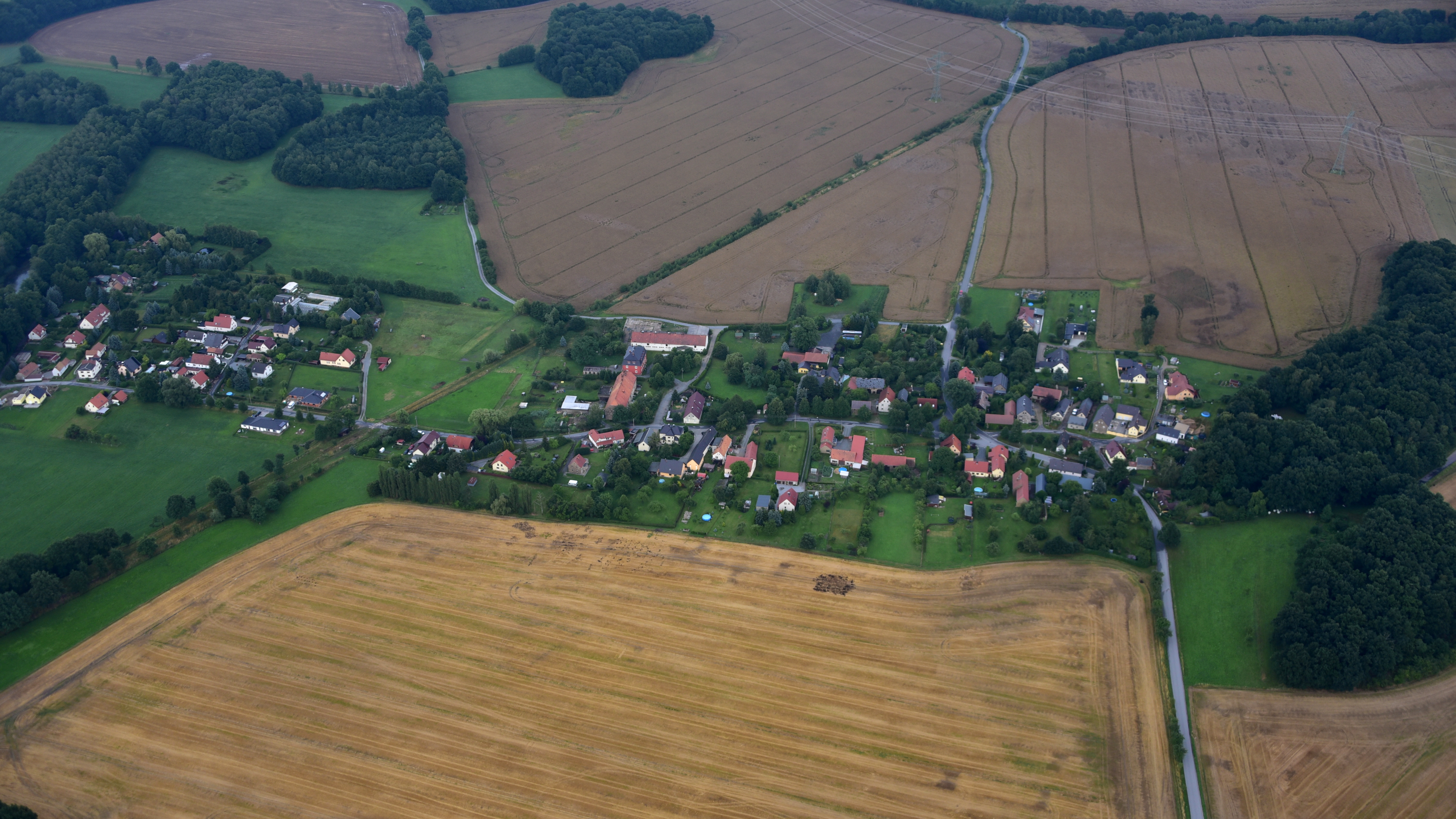 Quoos, Luftaufnahme (2017) Hornjoserbsce: Powětrowy wobraz Chasowa